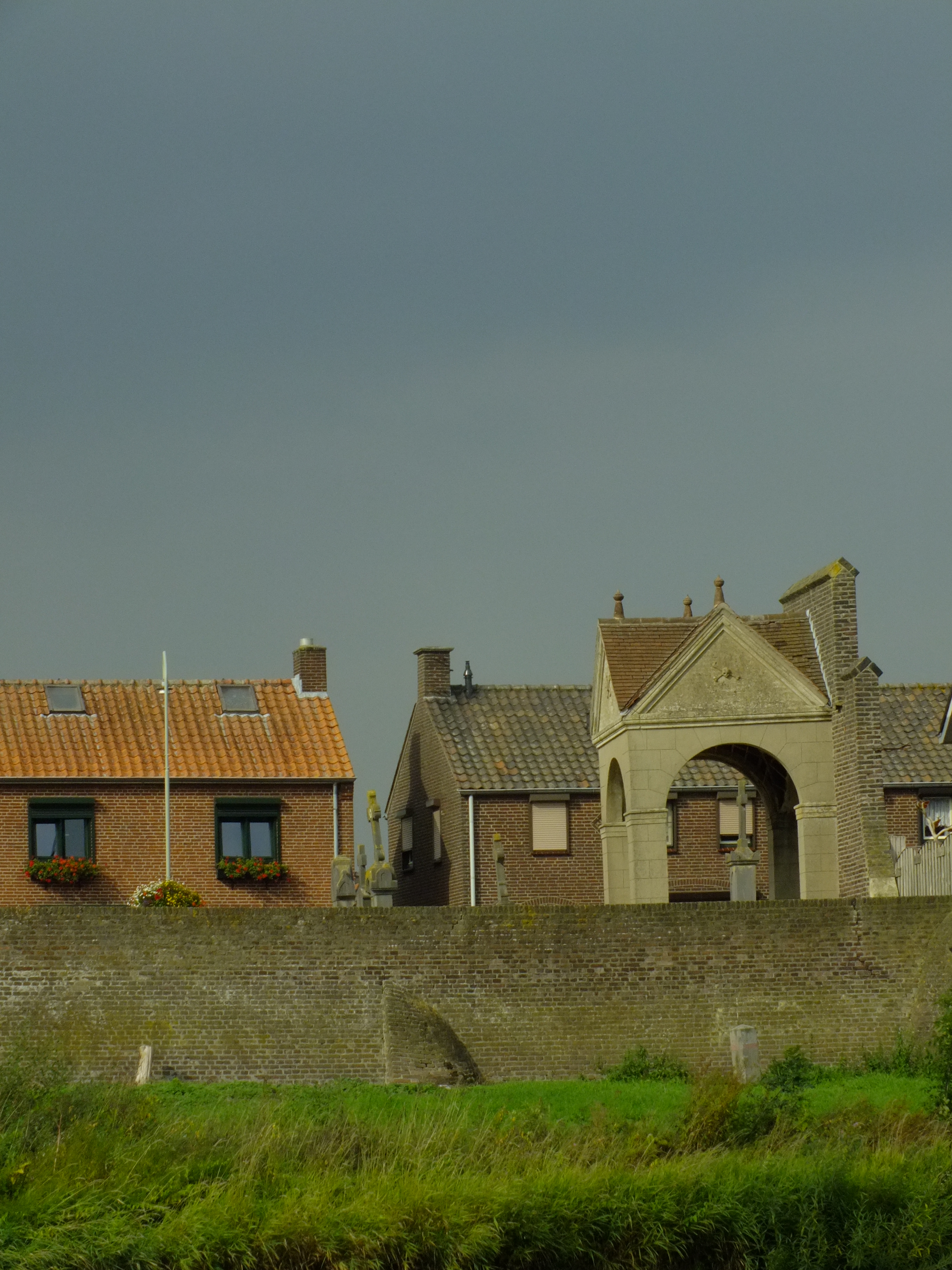 Kerkhofkapel bij Grotestraat 20 Well